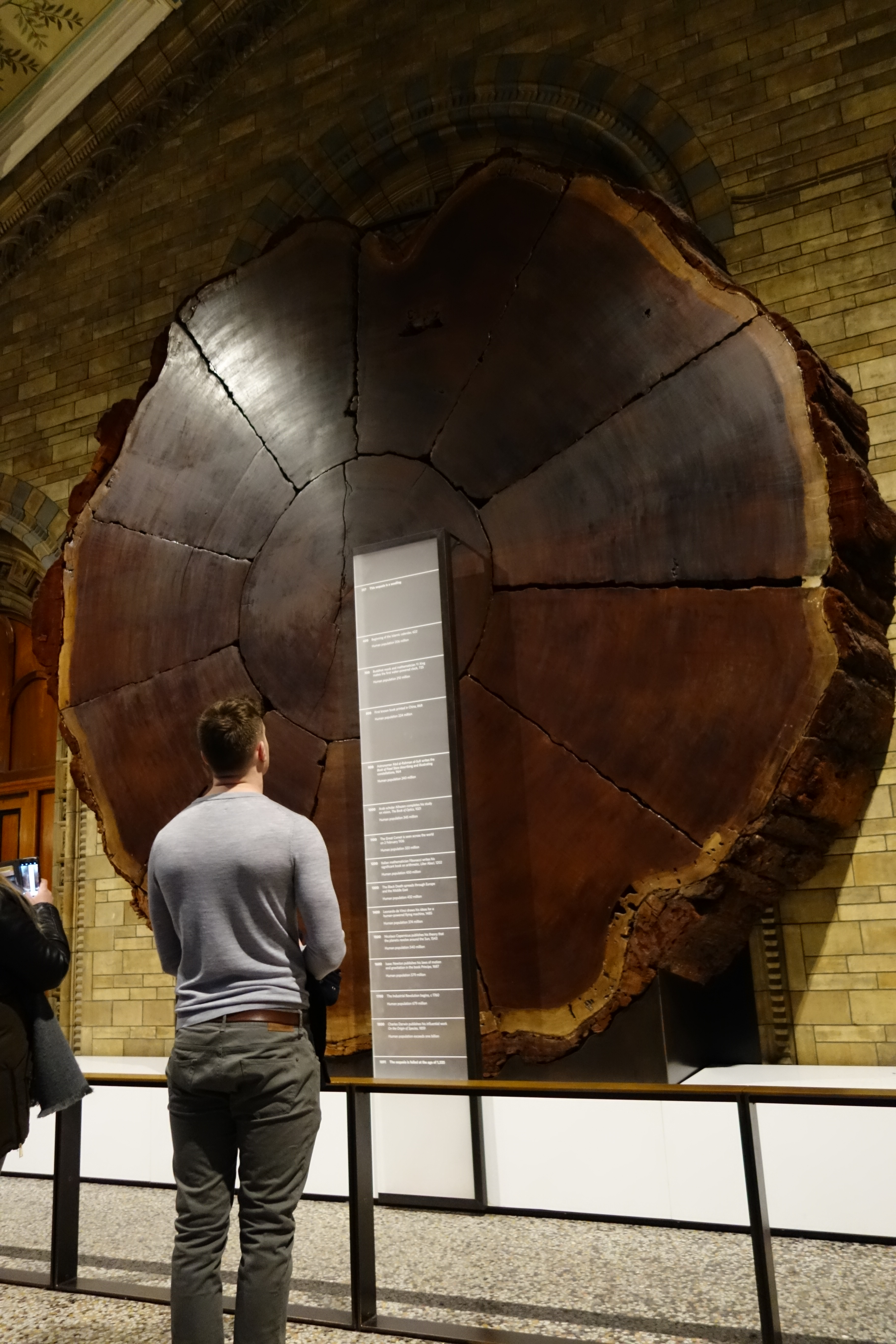 London, 2017